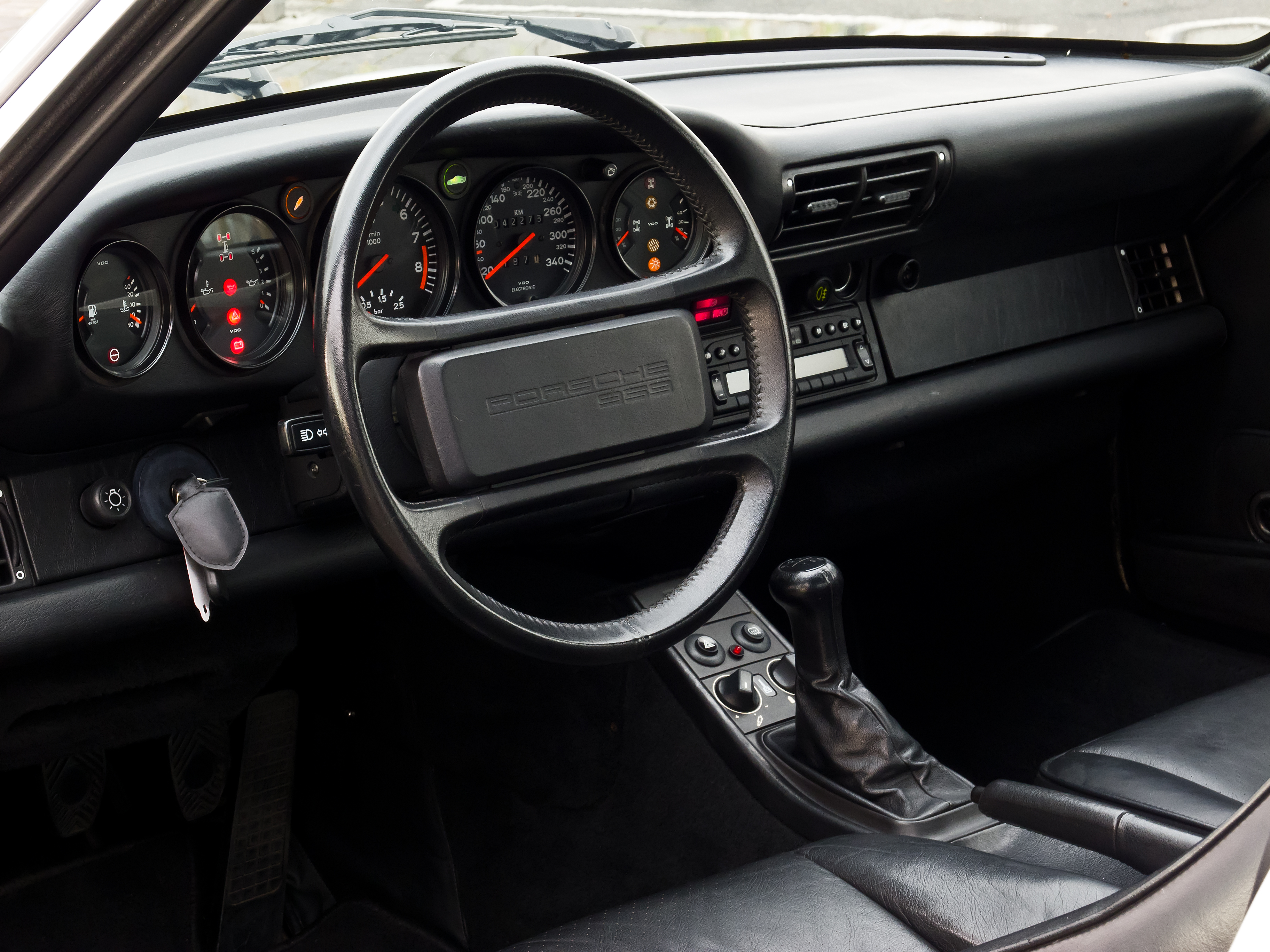 Innenraum eines Porsche 959.